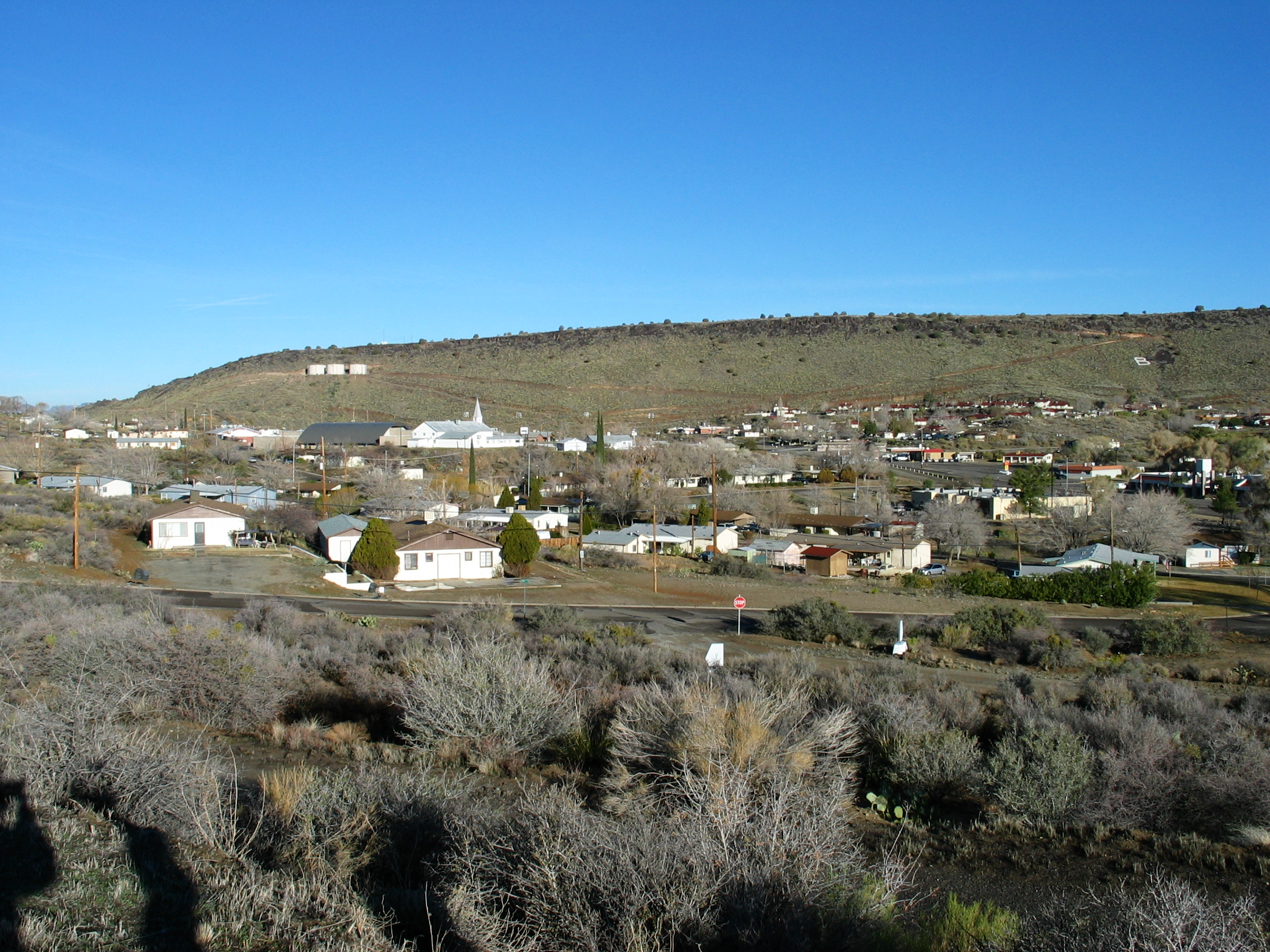 Stadtansicht von Bagdad, Arizona - Januar 2003